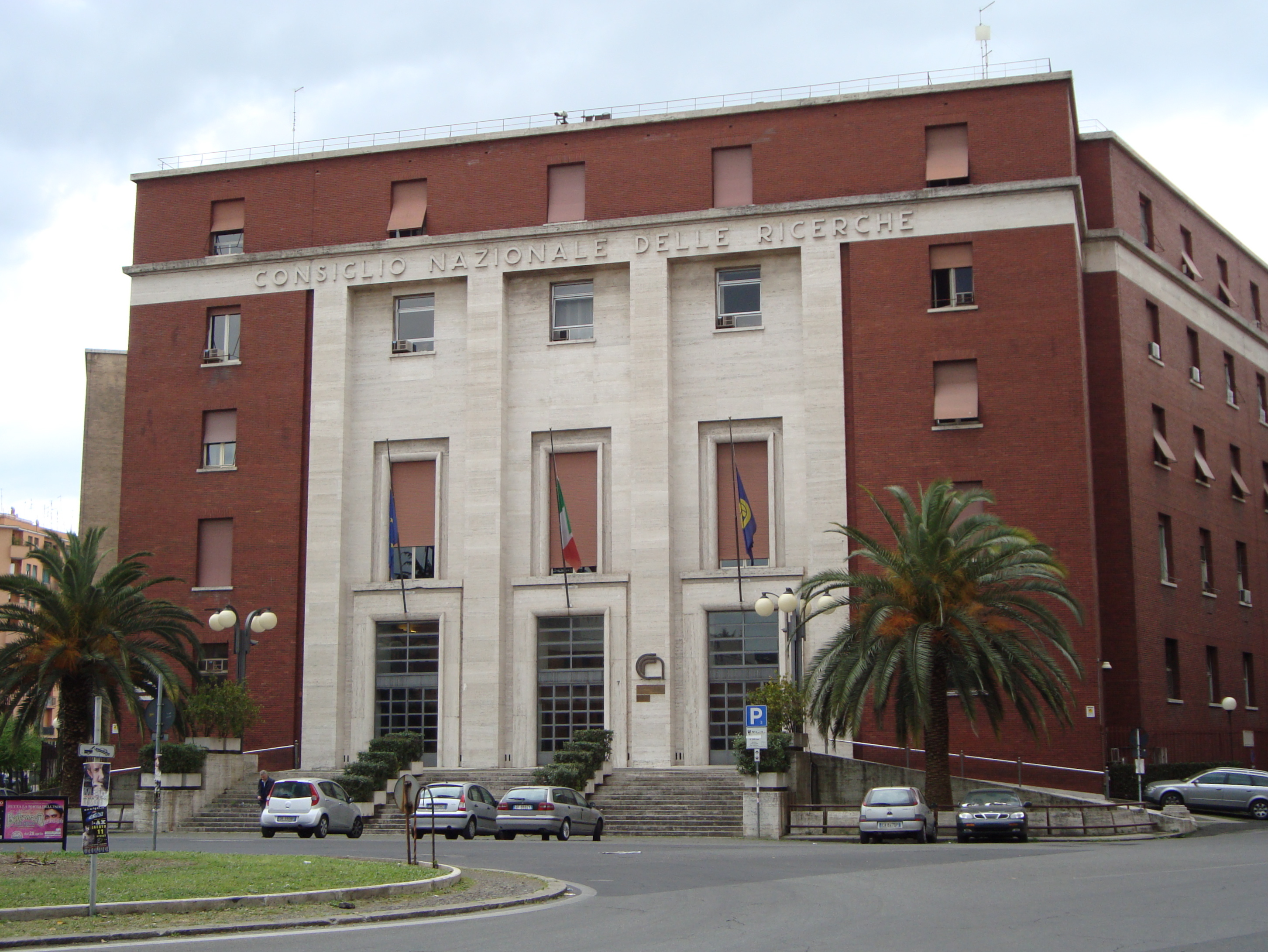 Conseil national de la recherche (Consiglio nazional delle ricerche) situé Piazzale Aldo Moro à Rome en Italie